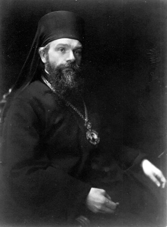 Sawatij, vl. jménem Antonín Jindřich Vrabec